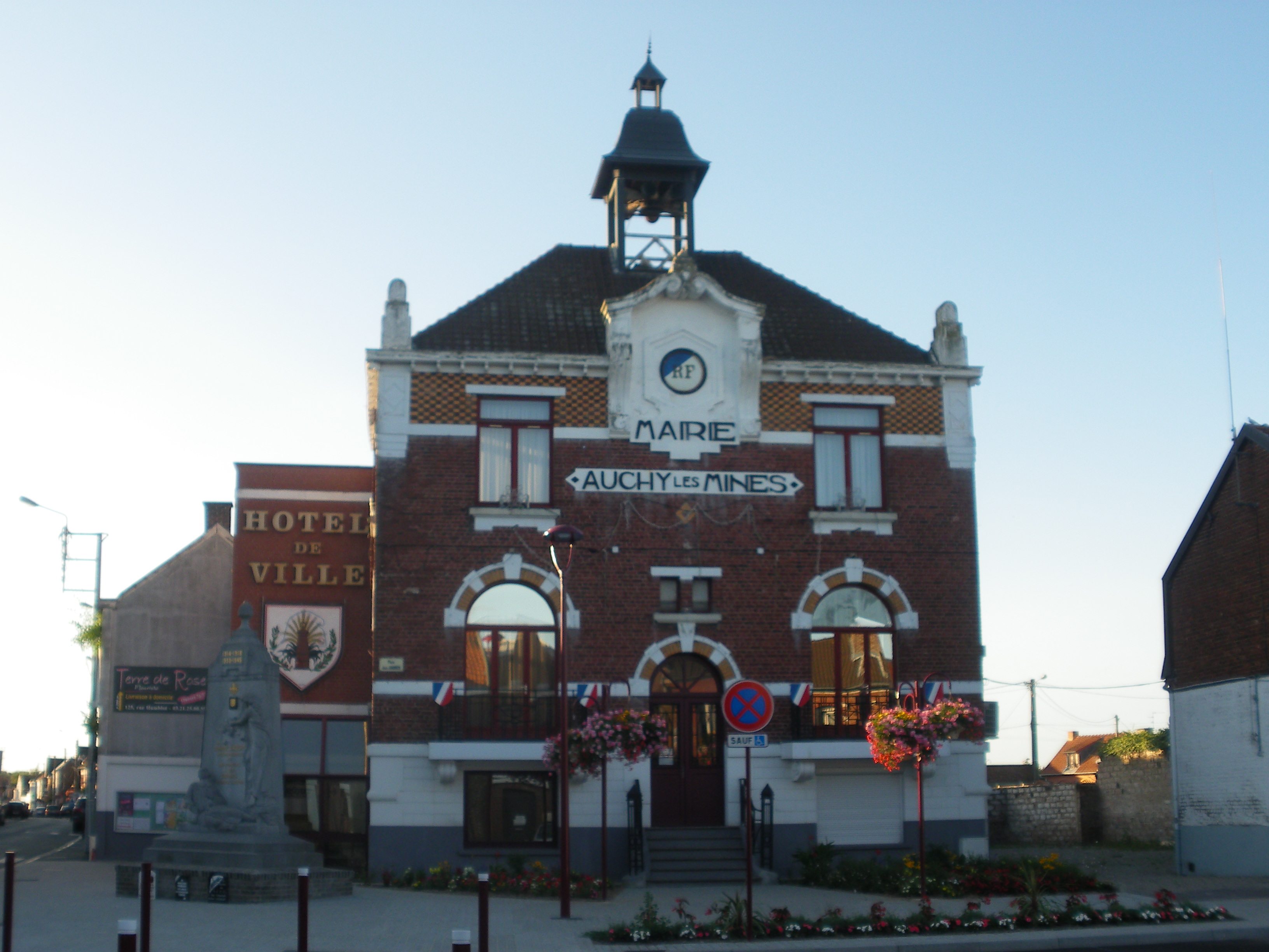 Vue de la mairie d'Auchy-les-Mines dans le Pas-de-Calais.